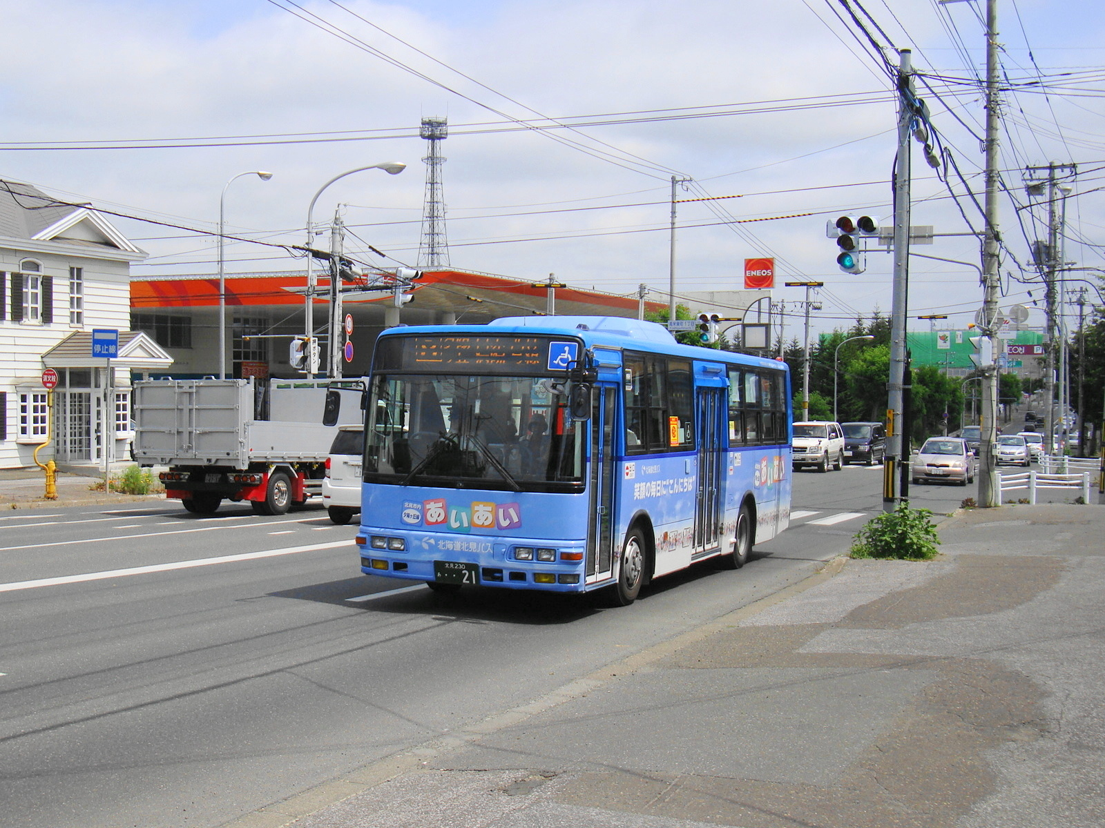 Kitami city line